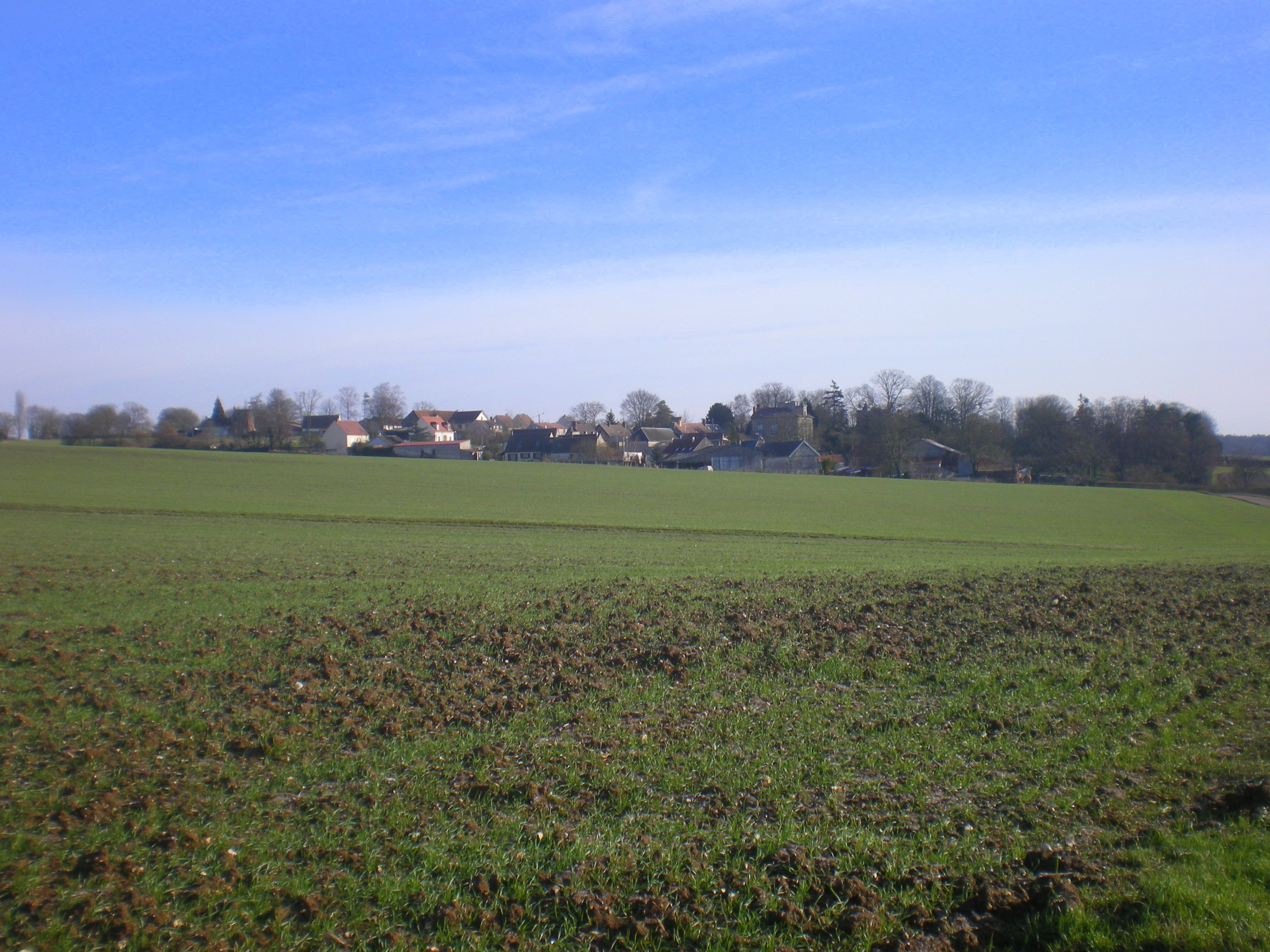 Le village de Maimbeville (Oise) depuis la route de Saint-Aubin (D532).